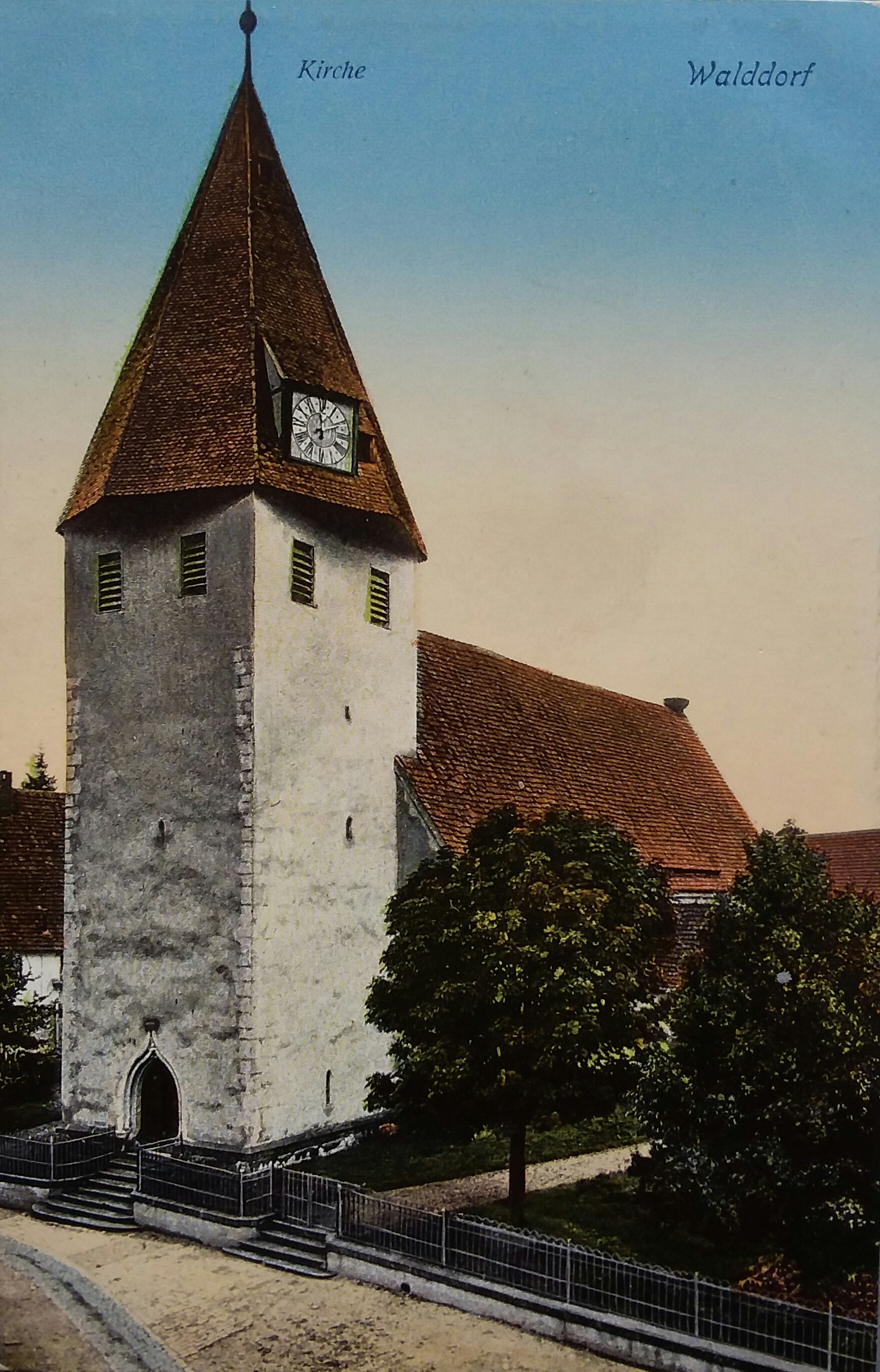 Walddorfhäslach-Walddorf historische Ansichtskarte evangelische Pfarrkirche Walddorf um 1910